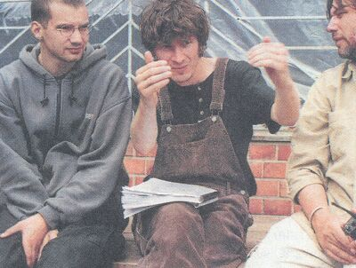 A "Macerás ügyek" című film "rendezői triumvirátusa". A képen balról: Erdély Mátyás operatőr, Hajdu Szabolcs rendező, Csala József első asszisztens.